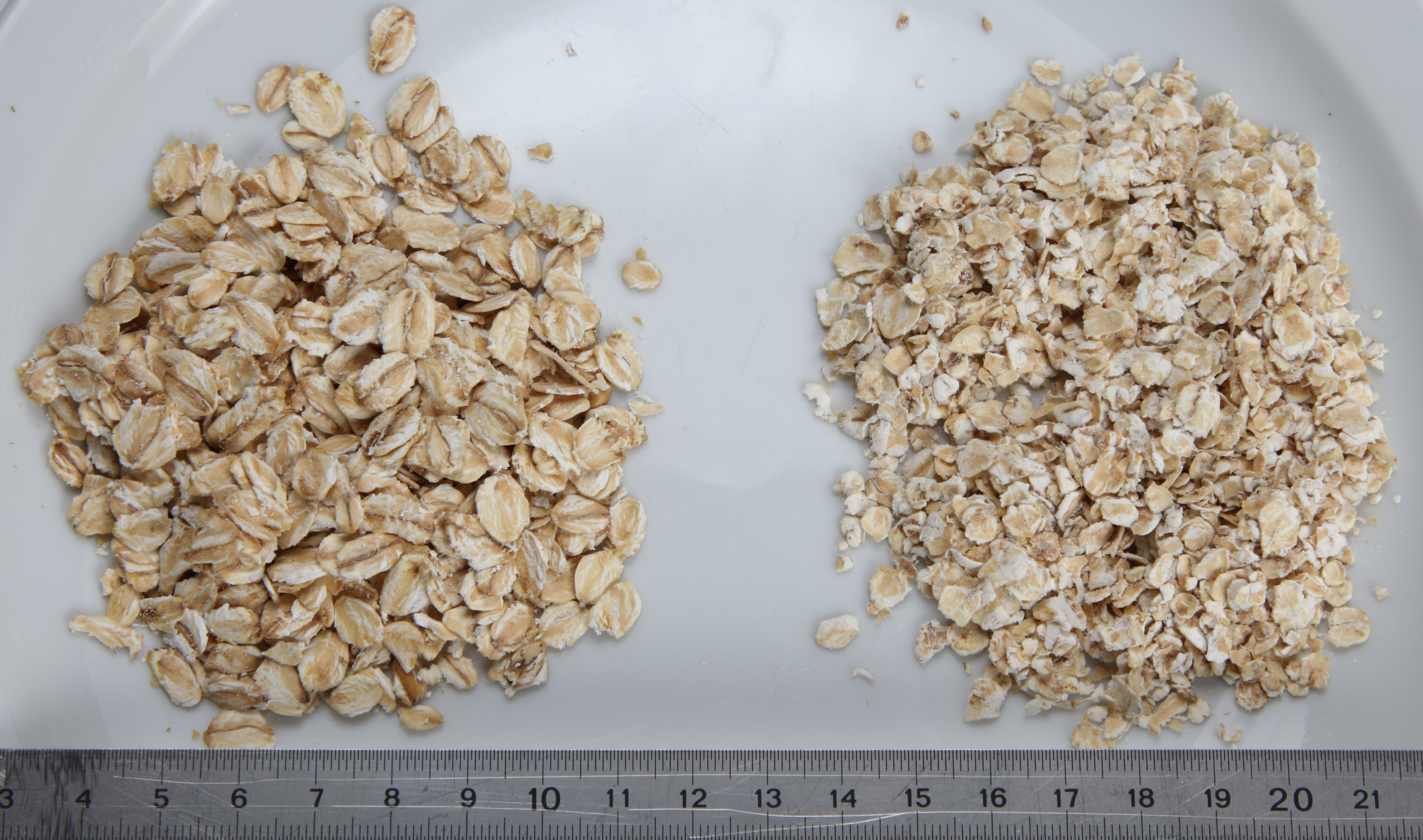 kernige Haferflocken (links) im Vergleich zu zarten.